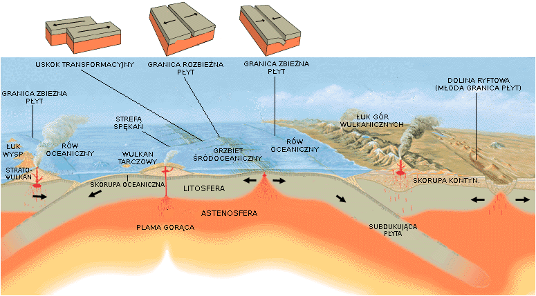 Granice płyt tektonicznych - wersja polska